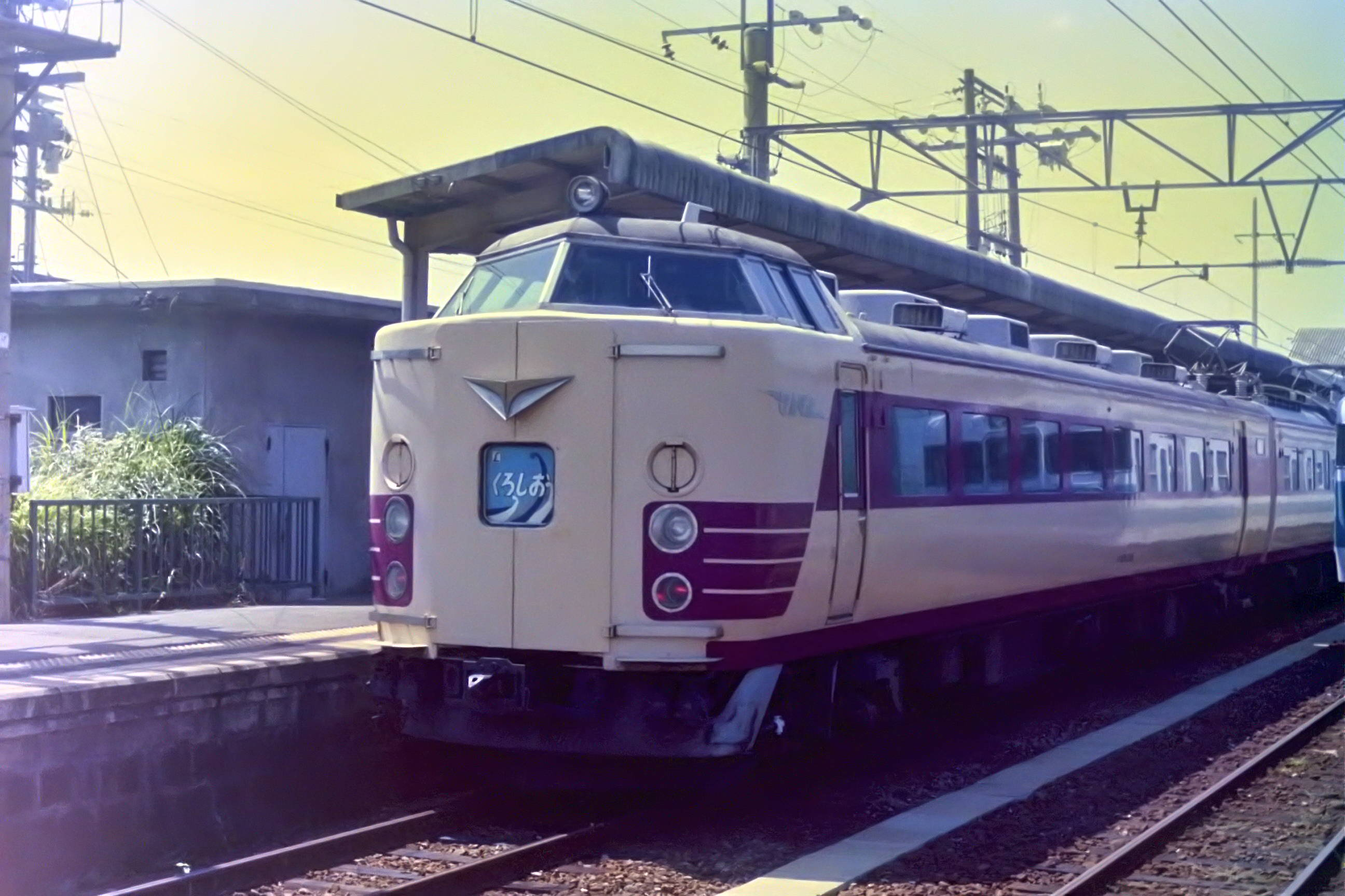 485系 特急「くろしお」 1985年 御坊駅